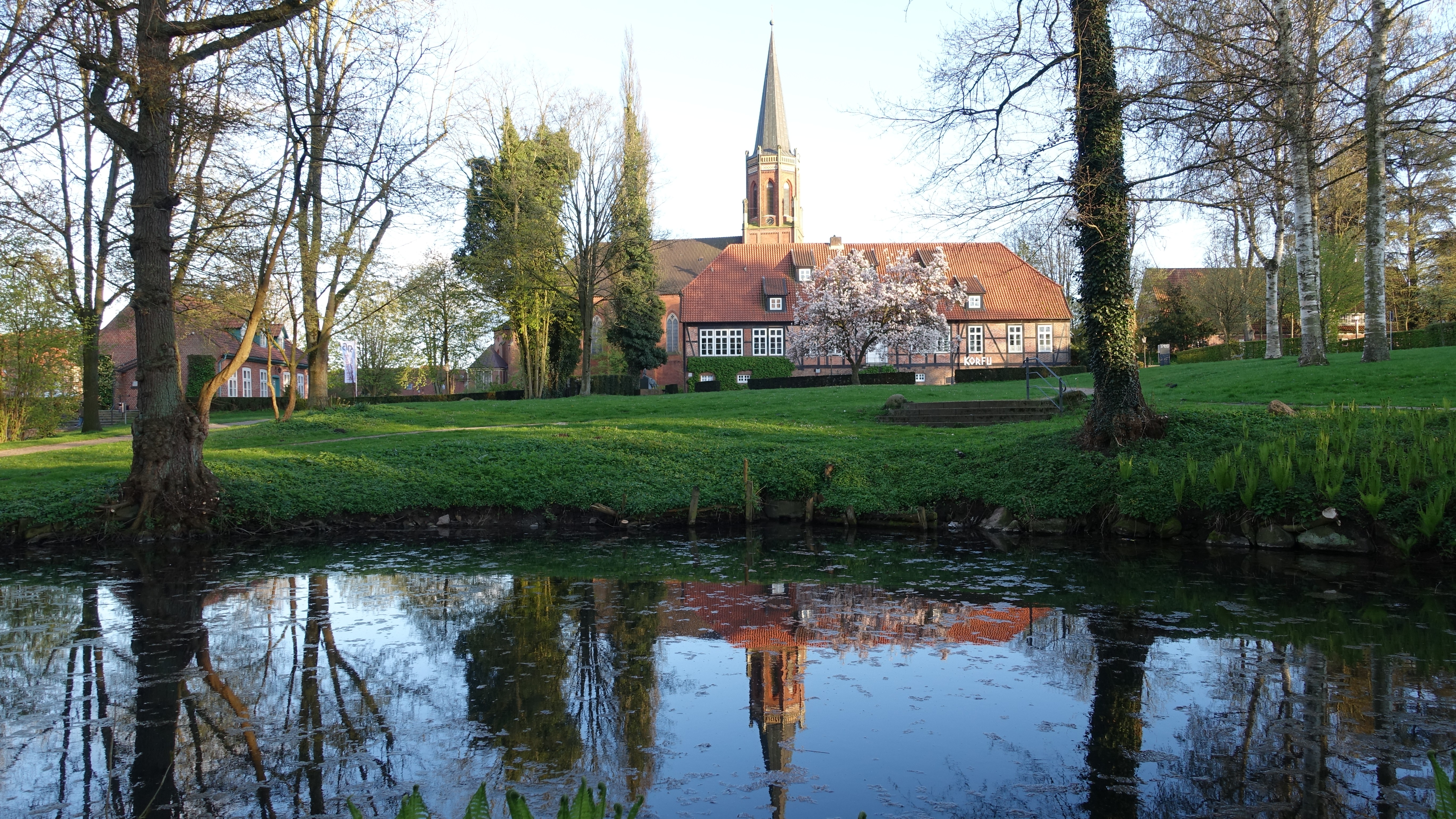 Harsefeld - Stadtpark mit Kirche_02